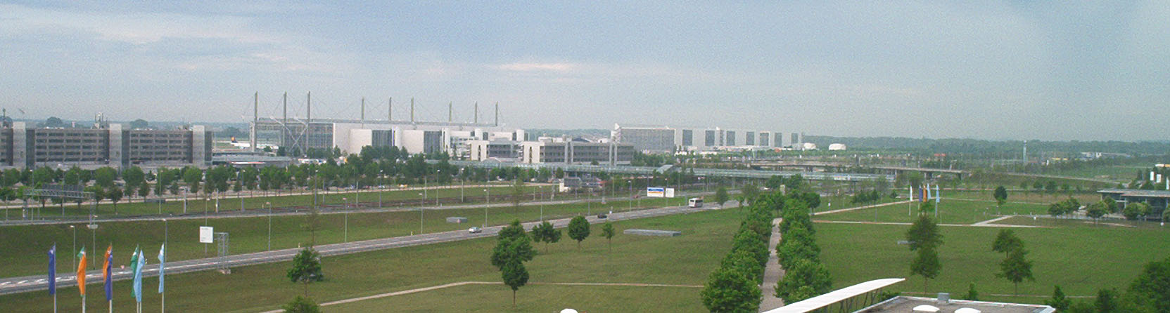 Flughafen Muenchen, Franz Josef Strauß